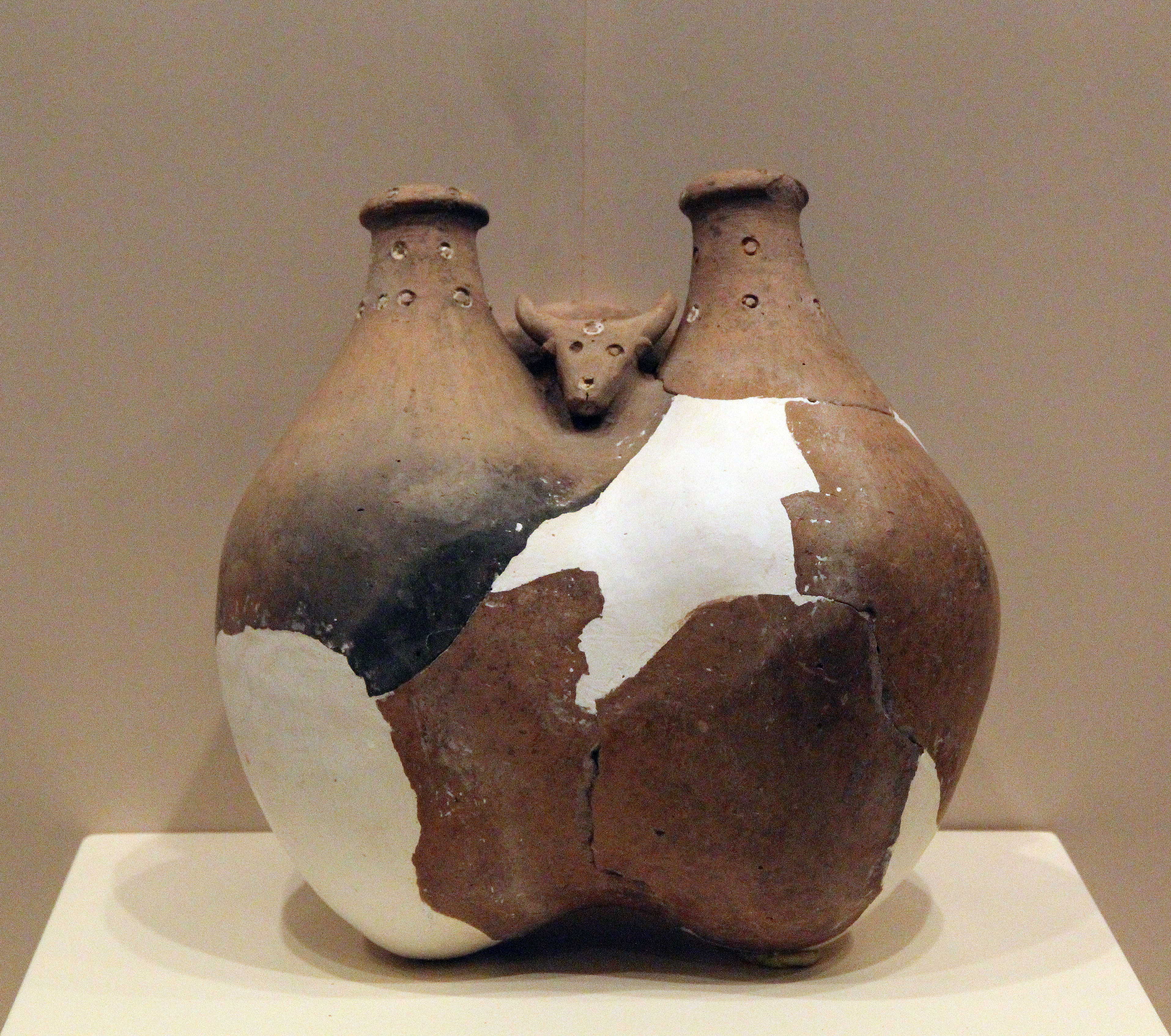 Archäologisches Museum Çorum, Zentraltürkei, Vase aus Šapinuwa